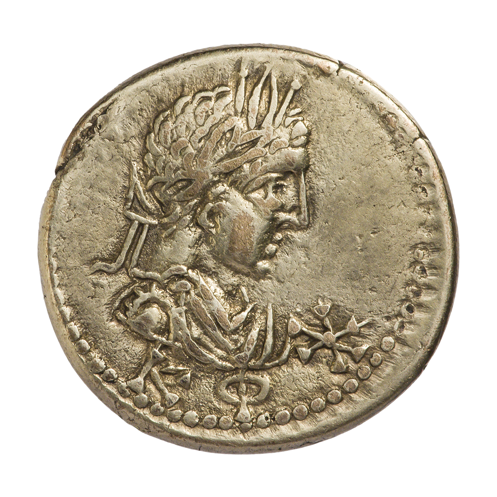 Боспорское царство. Рискупорид III (210—226). Статер. Ок. 223 г. Реверс. Бюст императора Александра Севера, вправо. Перед ним справа шестиконечная звезда; внизу КФ. Точечный ободок.